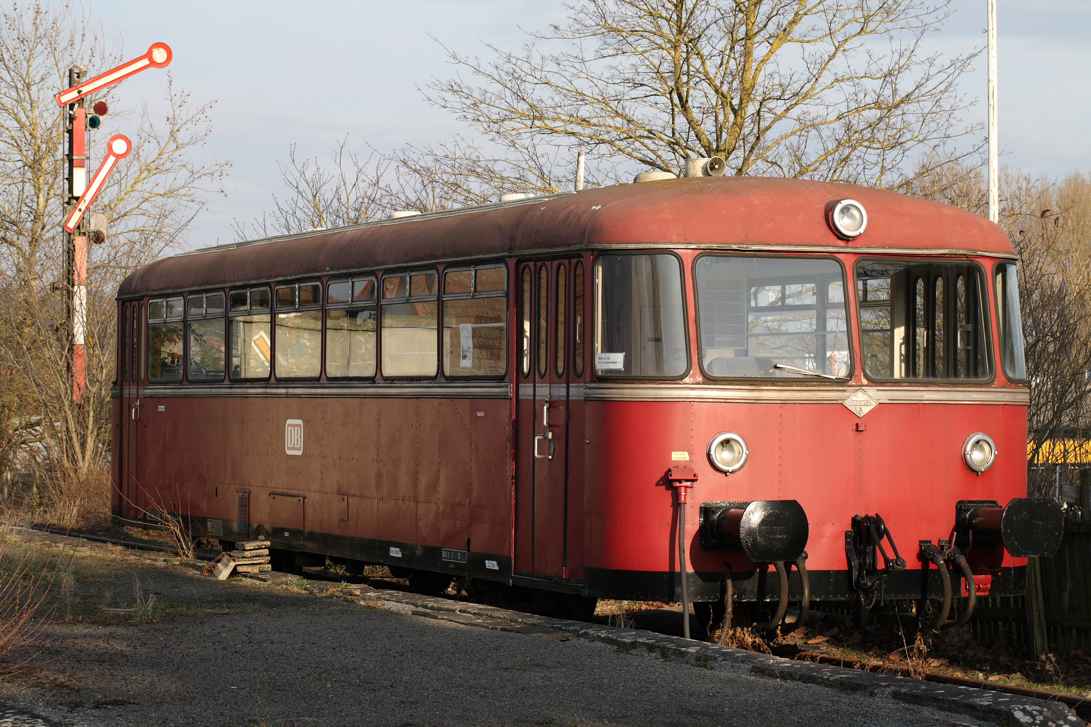 Uerdinger Schienenbus - VT 98 (Bahnhofsmuseum Borgholz; Bj.1961; Fabriknummer: 67961 / VS 98289; Indienststellung: 1961 an BW Husum; Ausmusterung: 14.September 1991 BW Flensburg